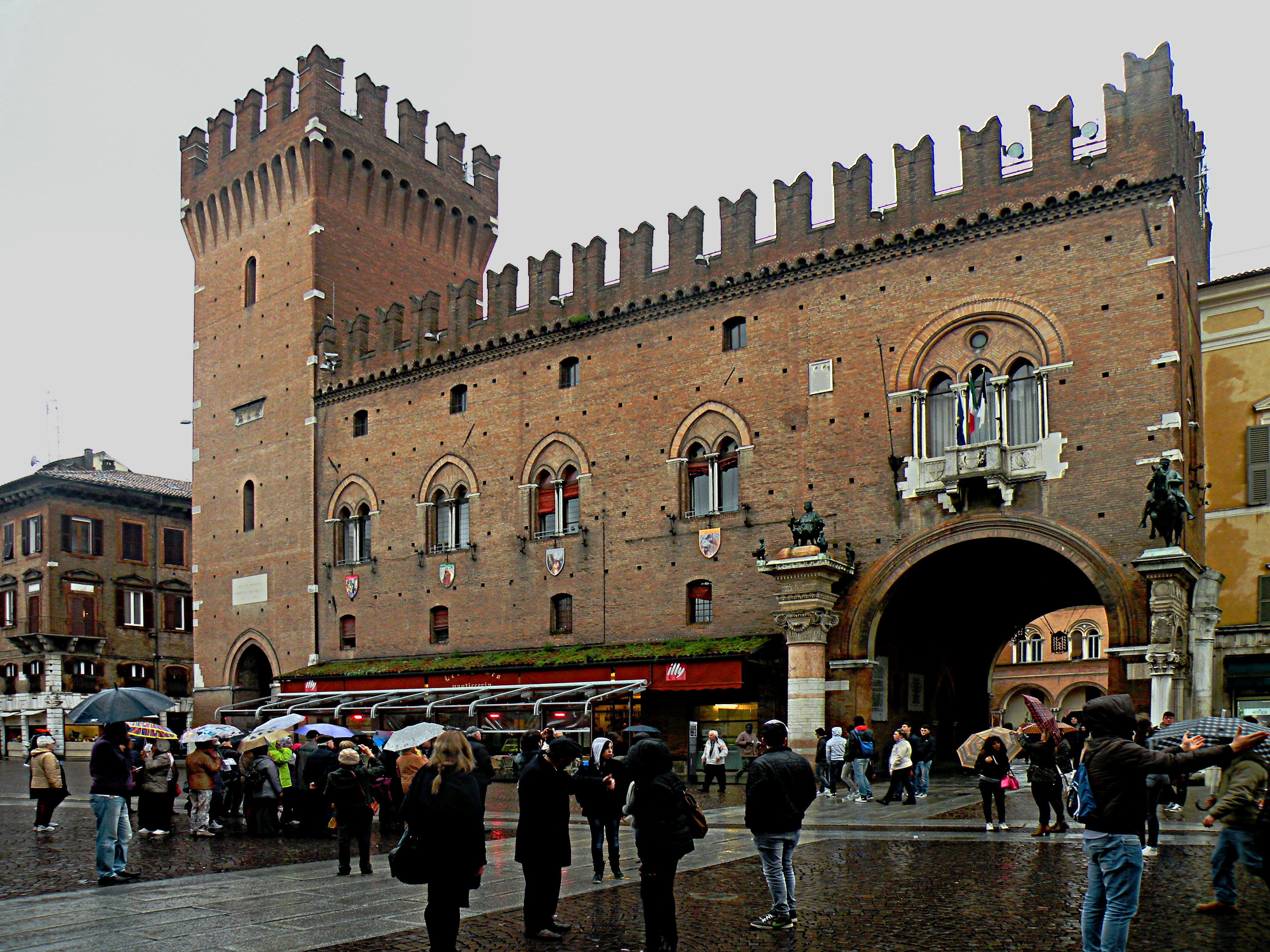 Palazzo Communale в Ферраре